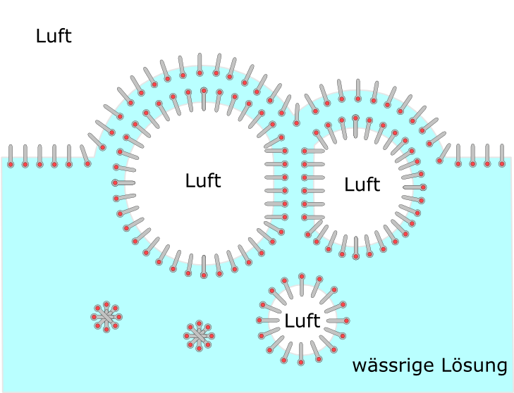 Schaumbildung durch Tenside